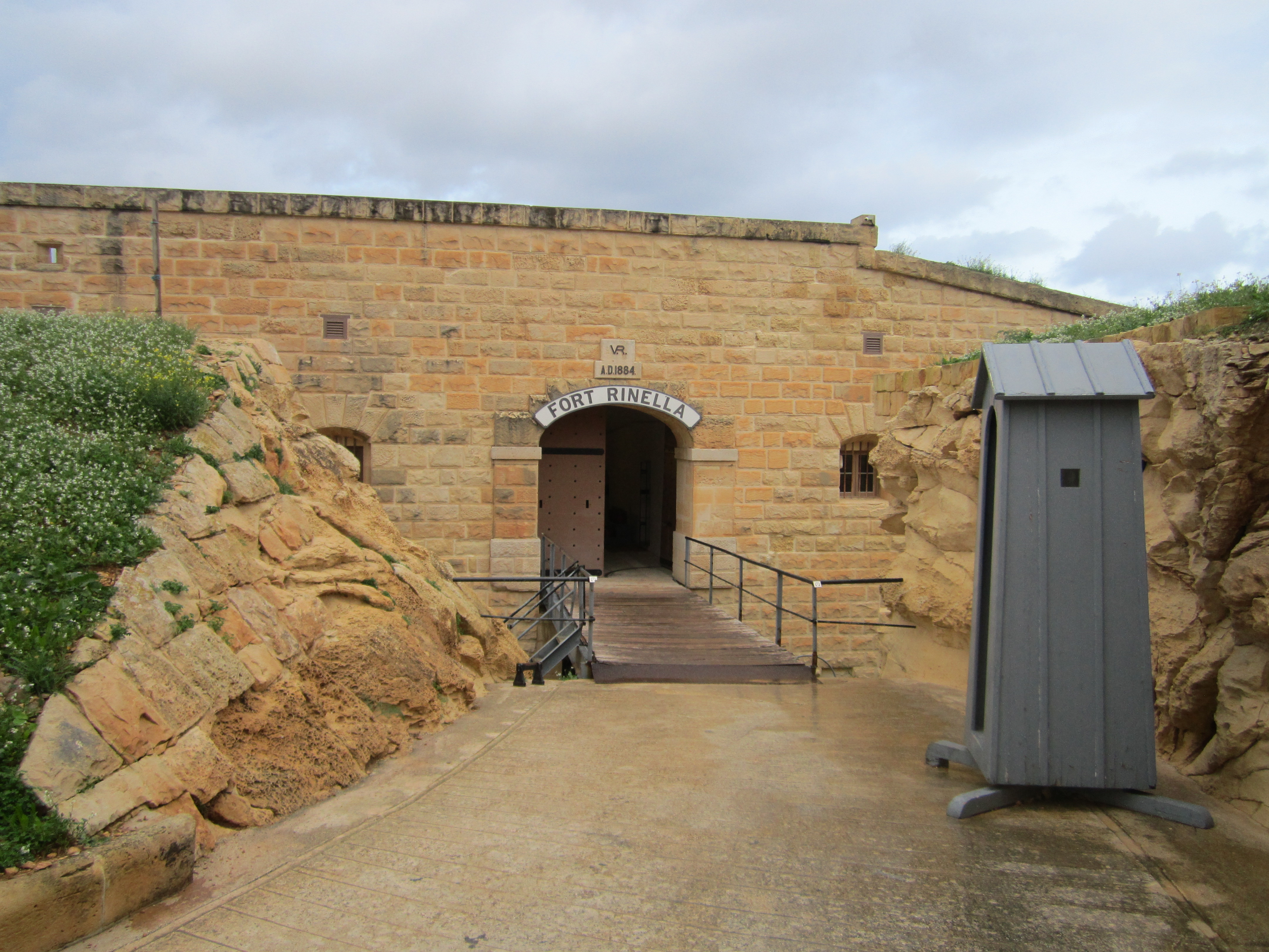 Entrada y garita de centinela